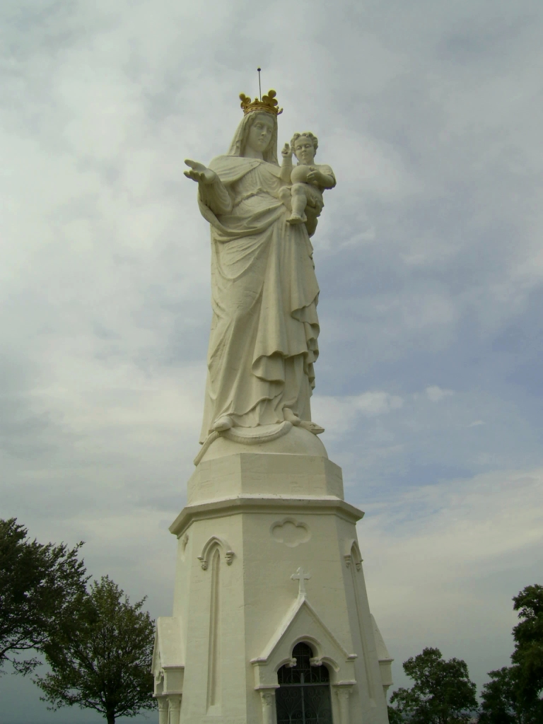 Vierge de Monton - Veyre-Monton - Puy-de-Dôme - France